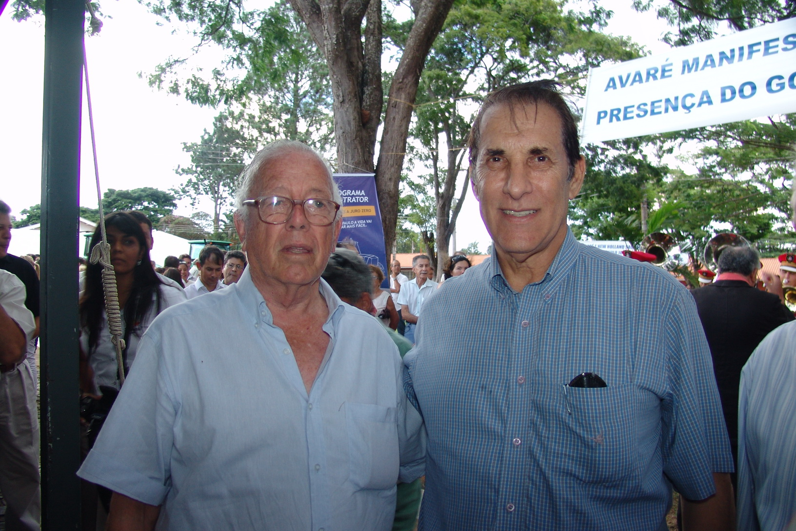 ex-prefeito de Avaré Fernando Pimentel e o ex-governador de São Paulo Orestes Quércia durante a inauguração da 44º EMAPA em Avaré, São Paulo, Brasil